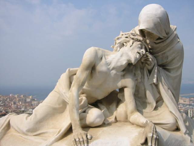 Chemin de Croix . Statue sur le parvis de la Basilique Notre-Dame-de-la-Garde à Marseille.